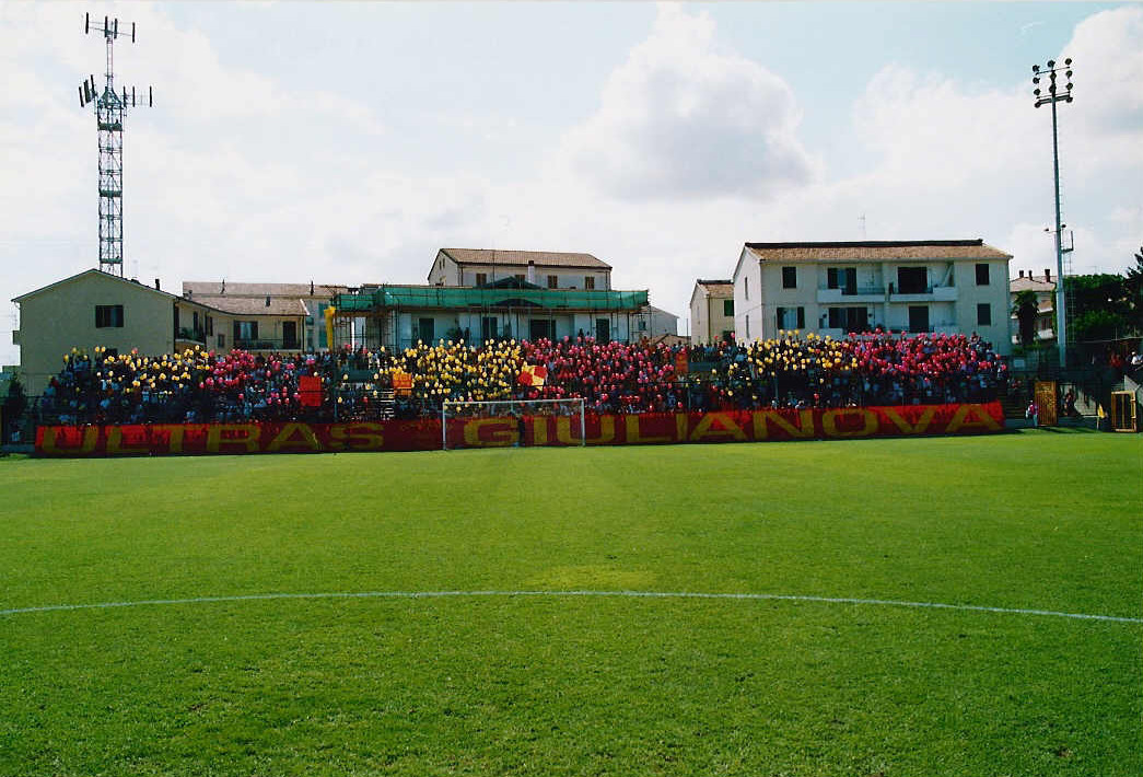 Rubens Fadini stadium, Giulianova, Italy